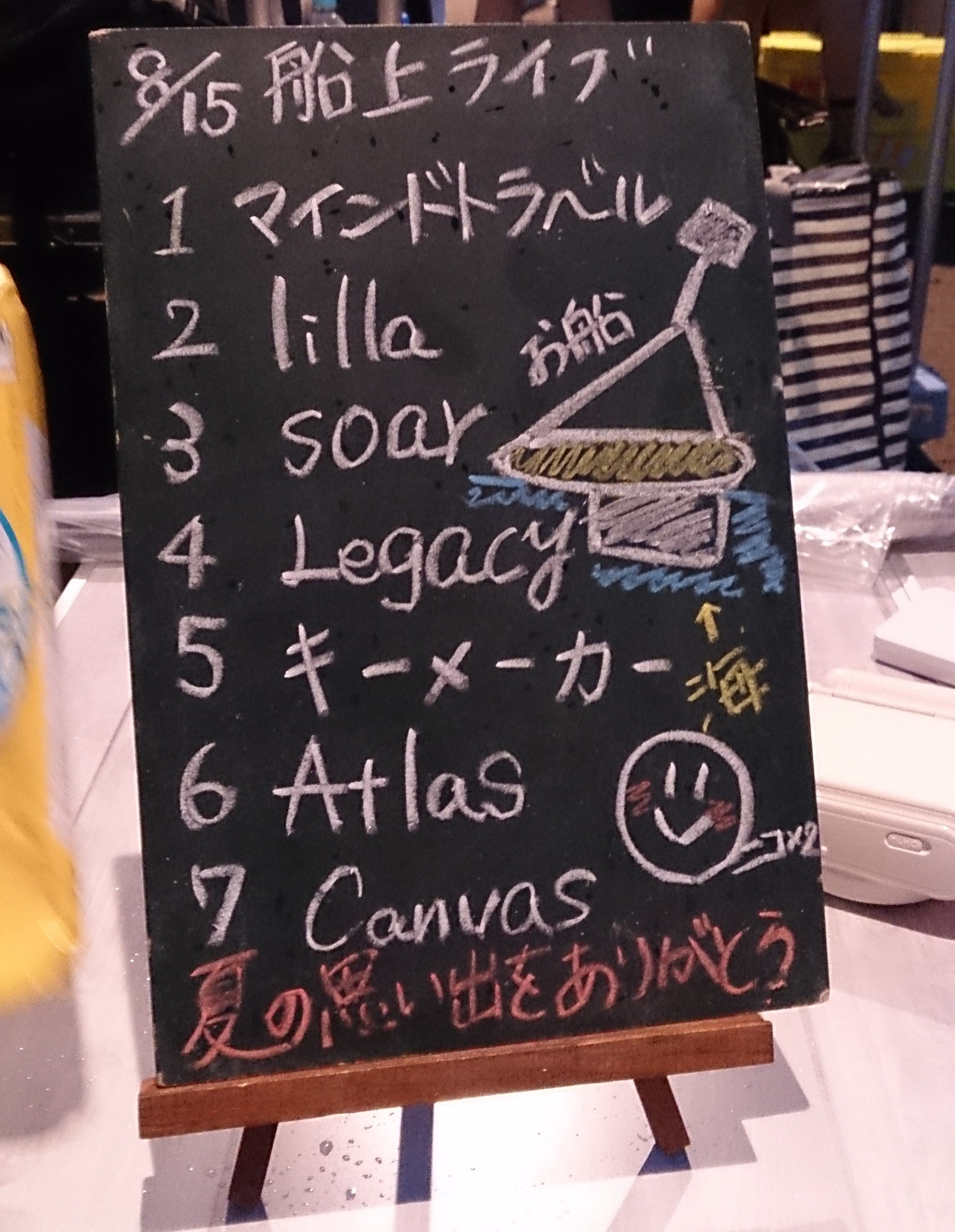 amiinAセトリボード(20170815(1))